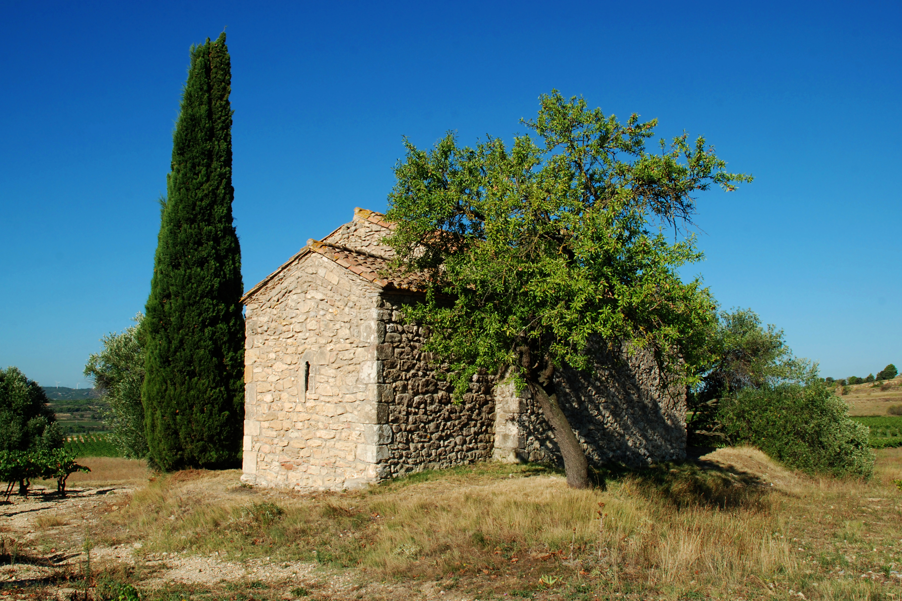 France - Languedoc - Aude - Moussan - chapelle Saint-Laurent (préroman) .